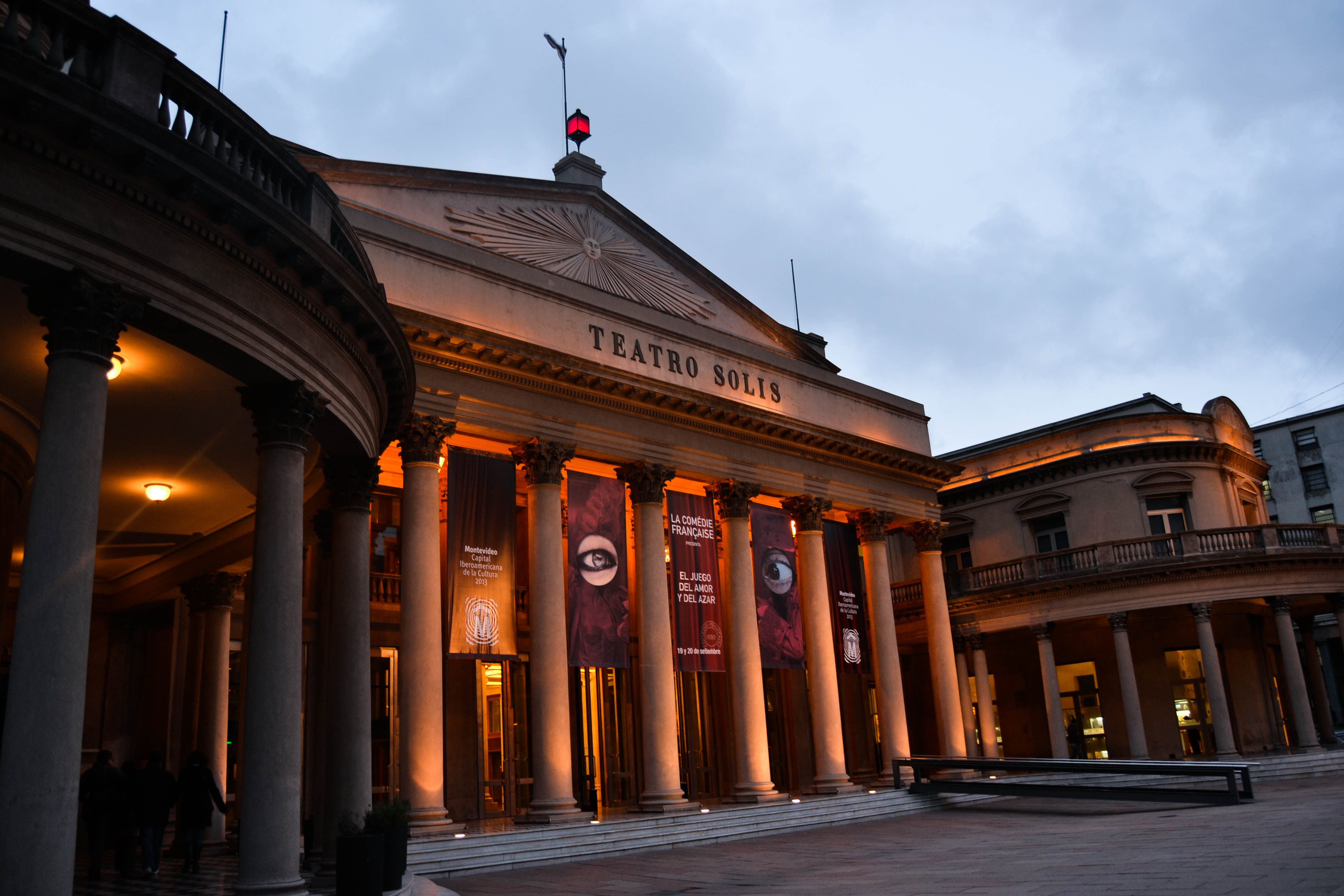 Teatro Solís. Ubicada en el departamento de Montevideo